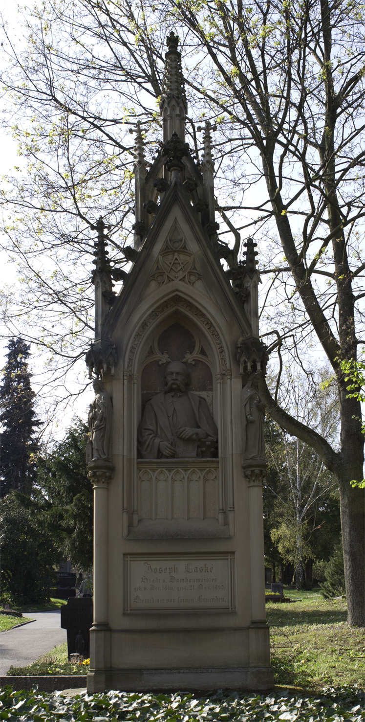 Grabmal des Mainzer Stadt- und Dombaumeisters Joseph Laské, Hauptfriedhof Mainz